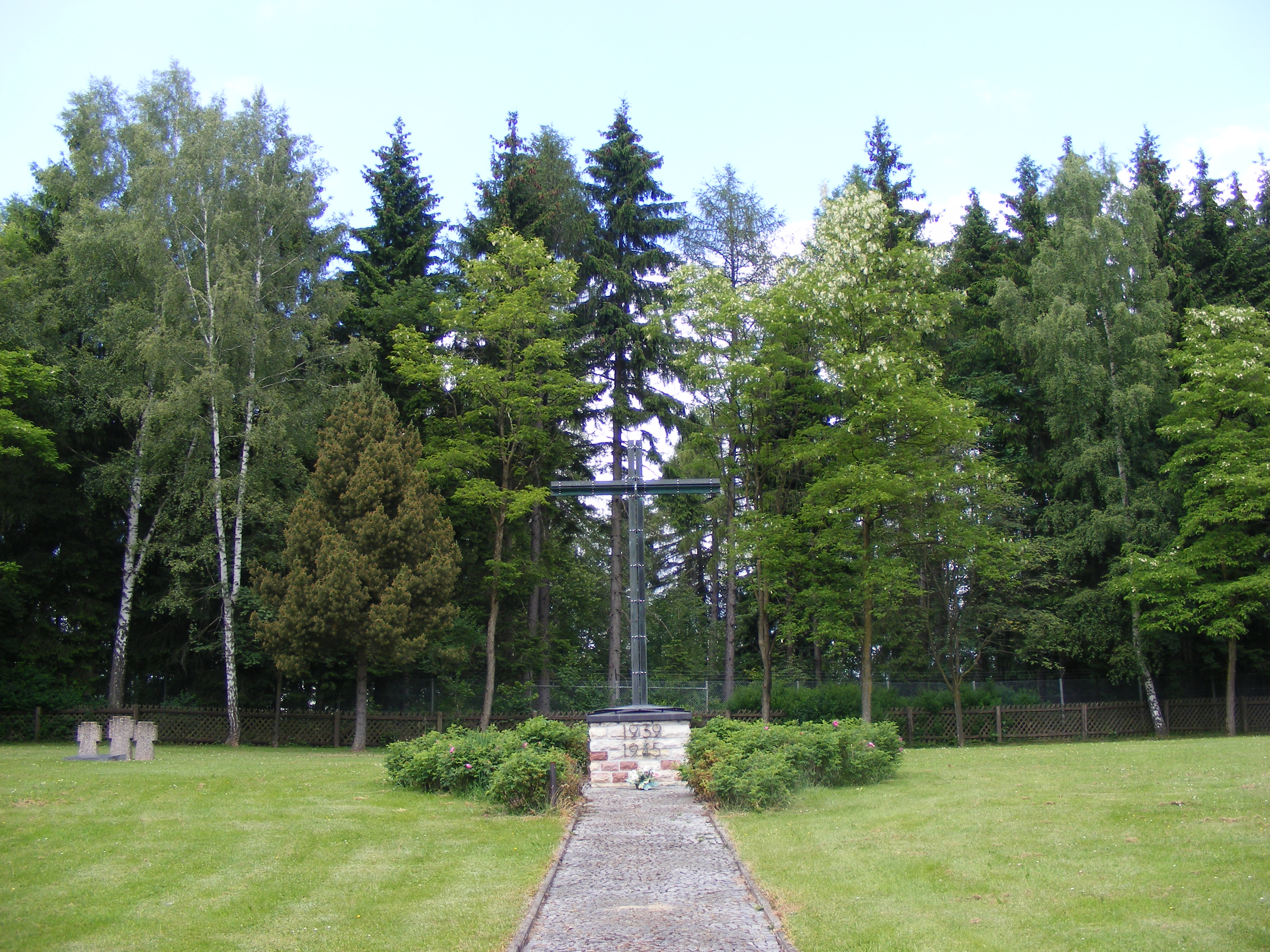 Poolsbegraafplaats bij Wildflecken in de Rhon